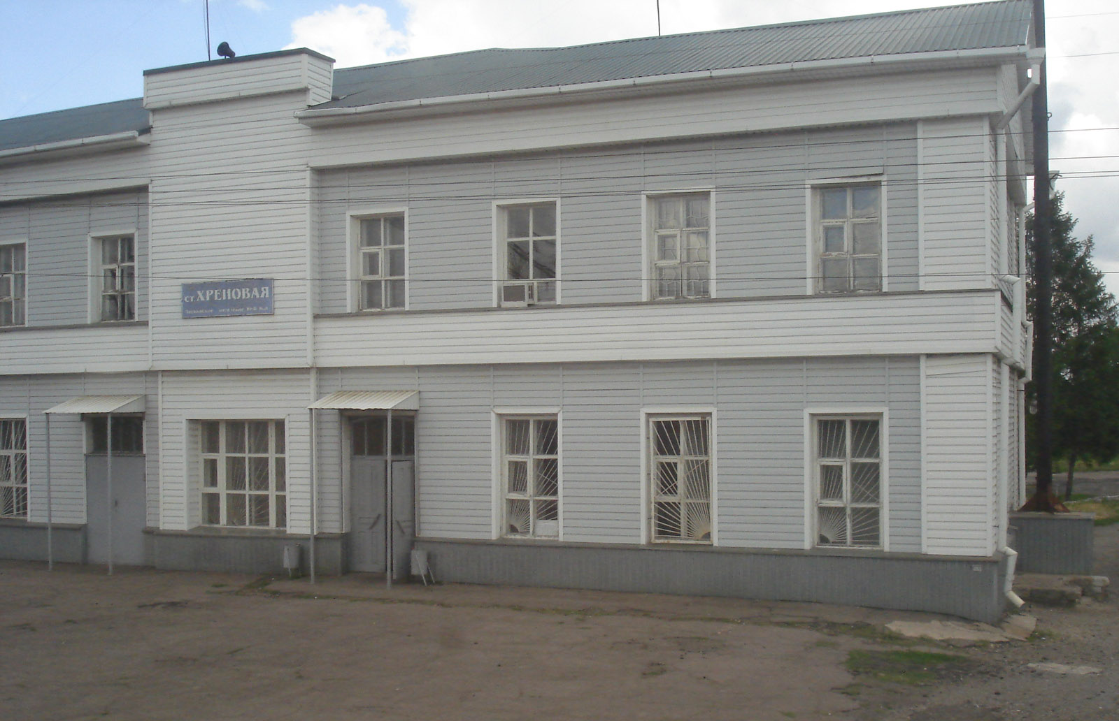 Здание ЖД-вокзала Хреновая